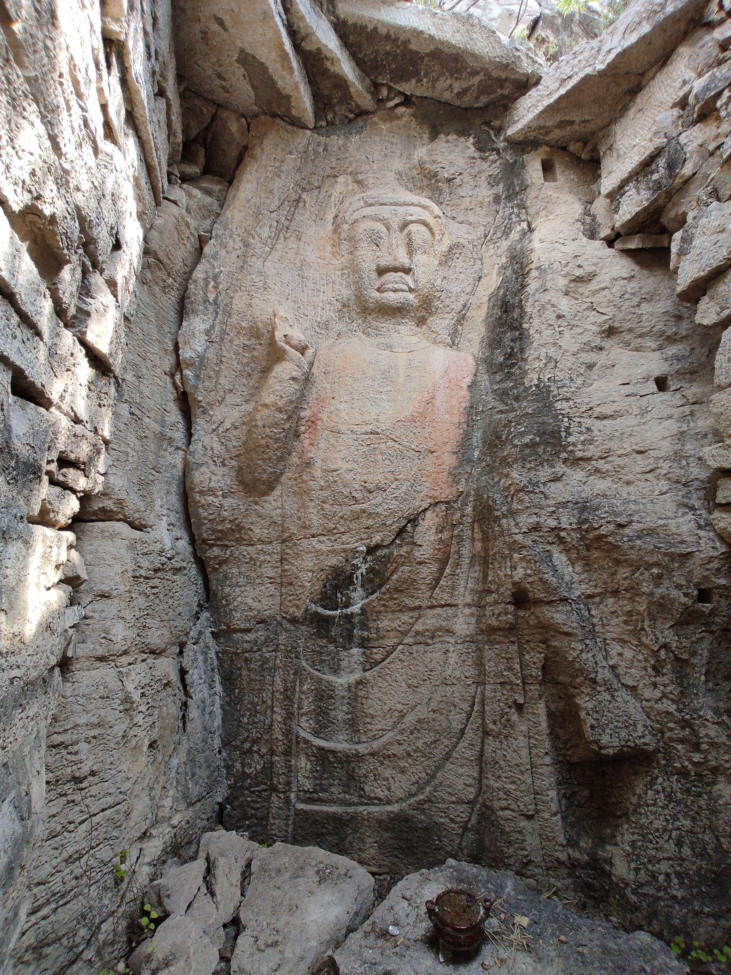 龙山摩崖石刻，位于中华人民共和国山东省泰安市东平县东平街道无盐村东龙山南坡龙山书院遗址附近，系一处文物保护单位